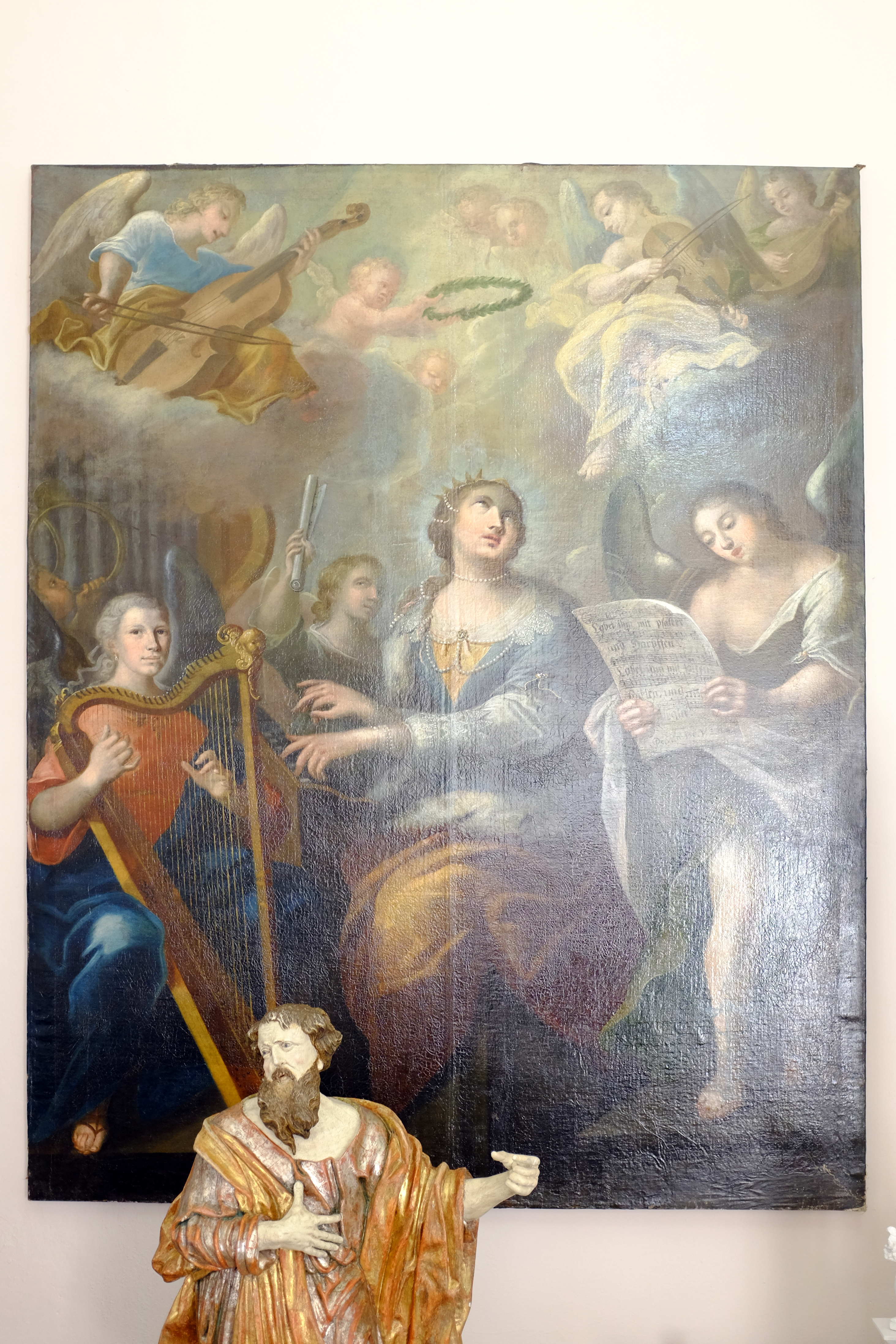 Obraz od barokního malíře Eliáše Dollhopfa (Svatá Cecílie s anděly) z roku 1768, umístěný v expozici muzea v zámku v Sokolově